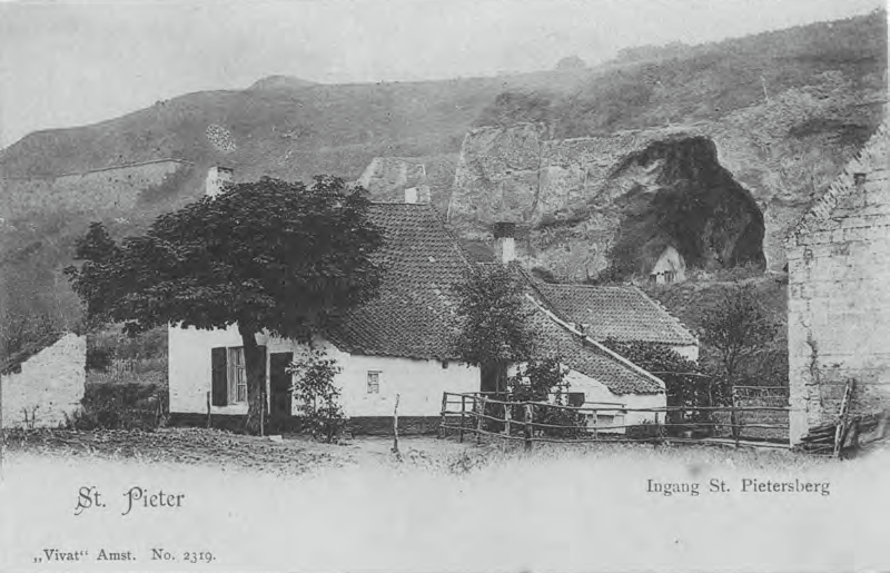 Grote Ingang op prentbriefkaart van 1905, Sint-Pietersberg, Maastricht, Nederland